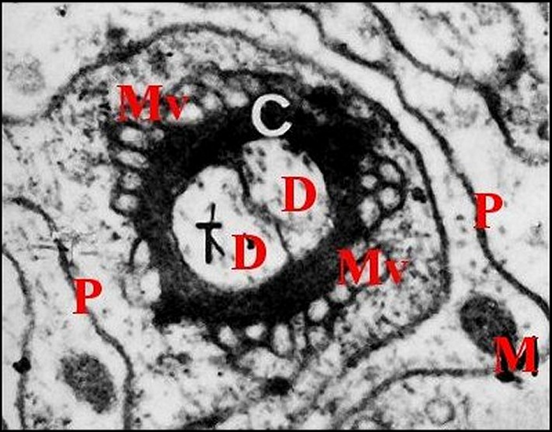 Unité fonctionnelle de l'organe gonoporal (sensille) vue au microscope électronique à transmission.